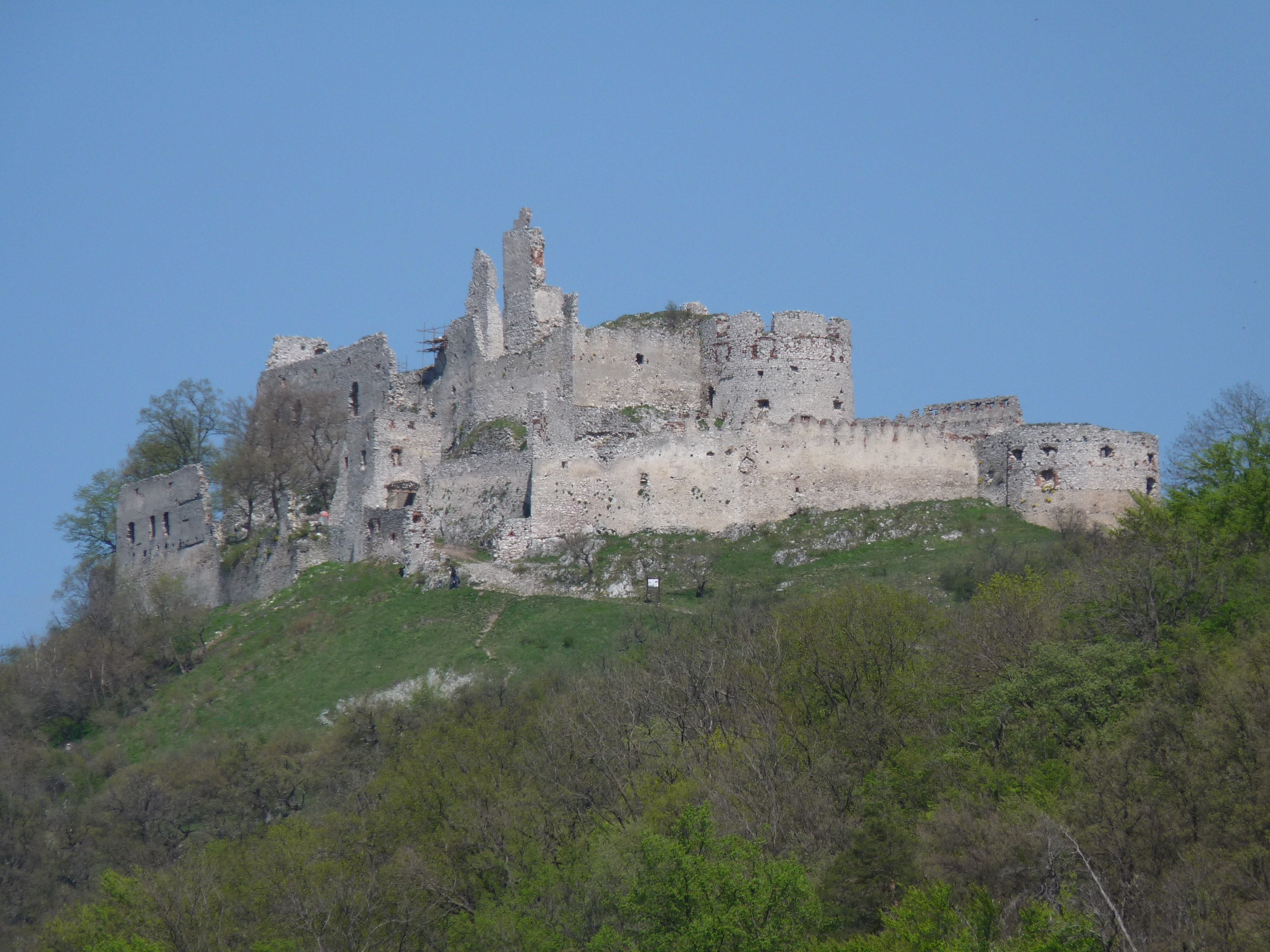 Plavecký hrad z Plaveckého Podhradia